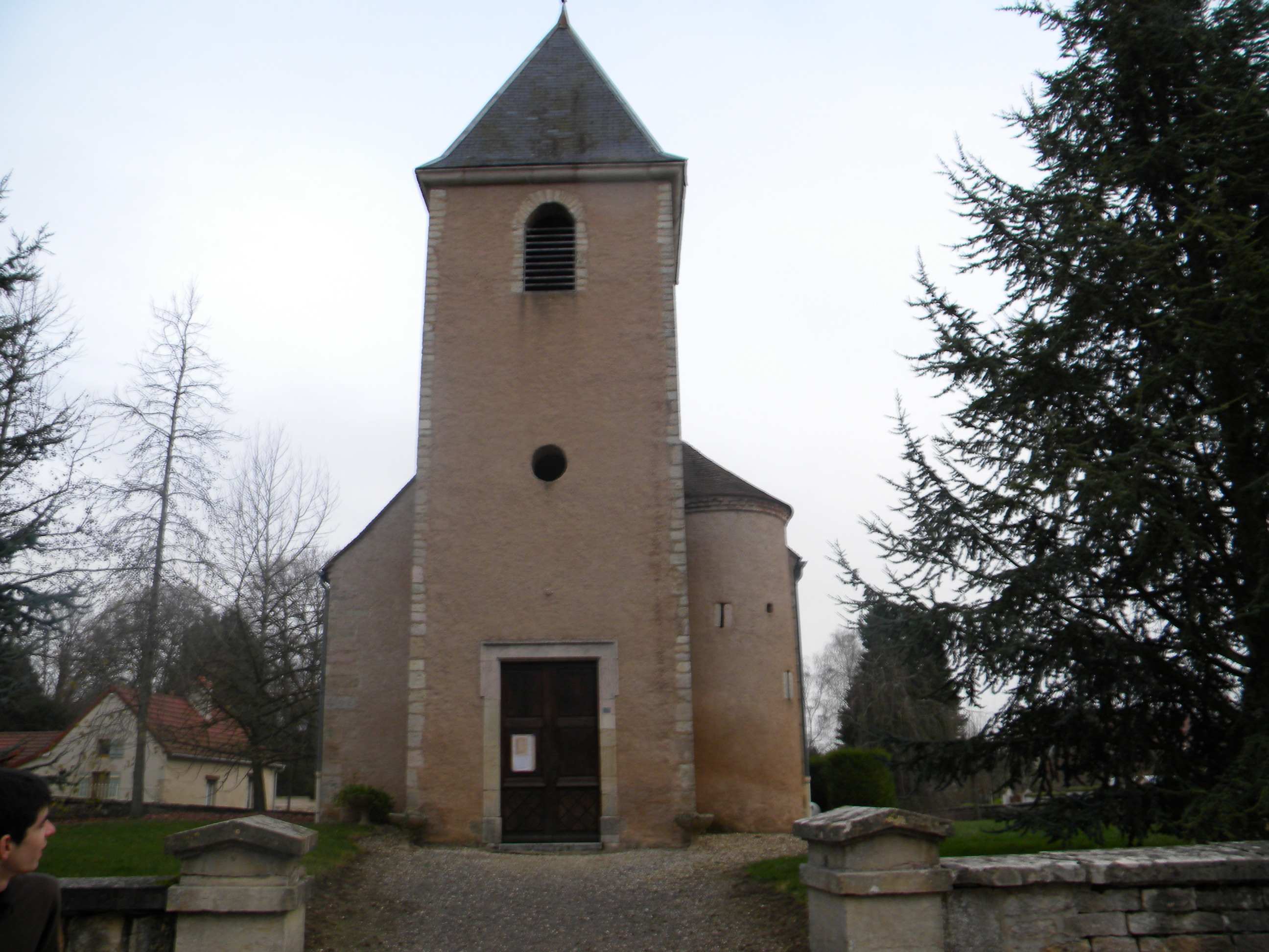 pregxejo de Corgengouxx